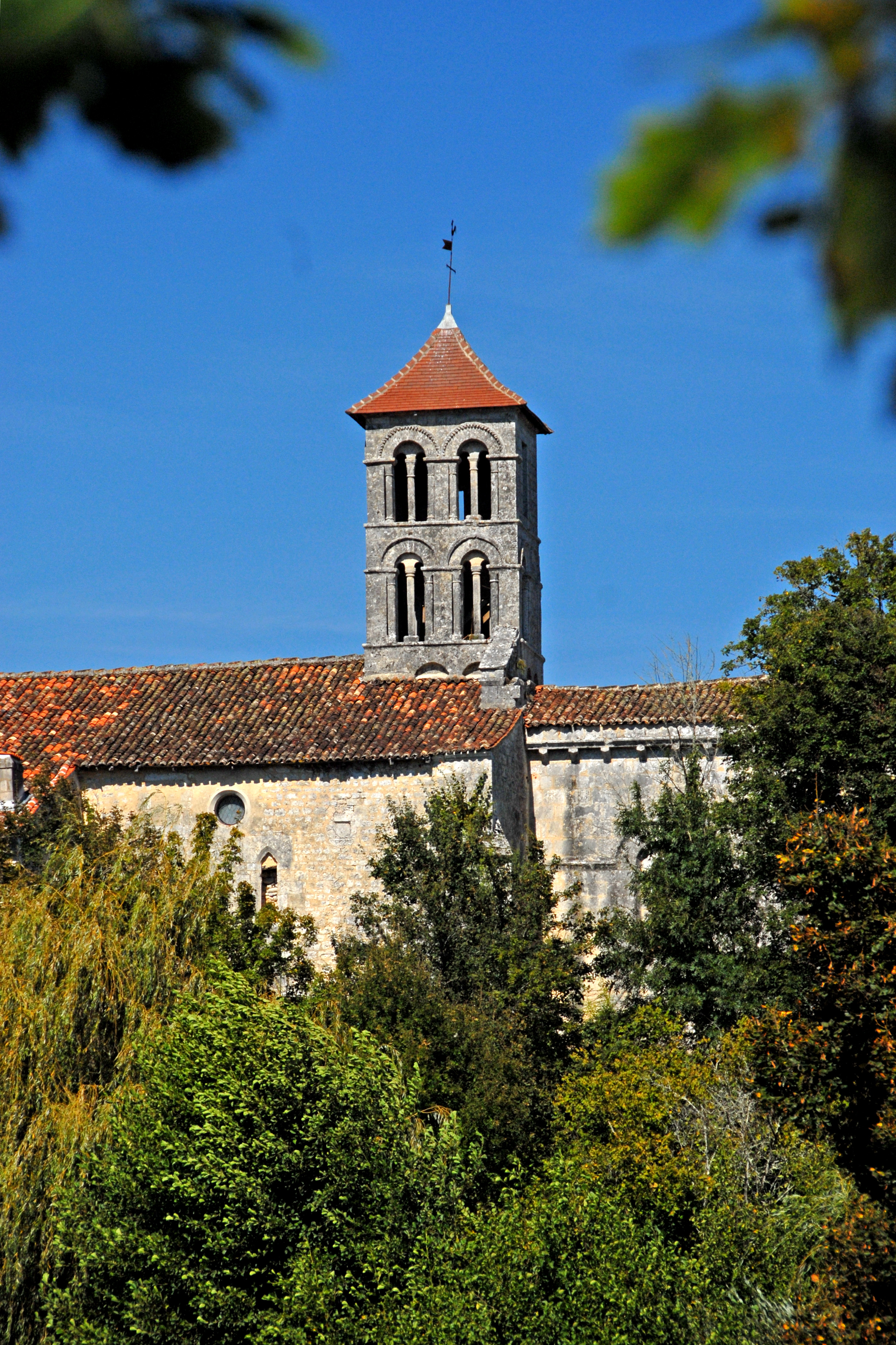 Saint-Bris-de-Bois,Ansicht von S